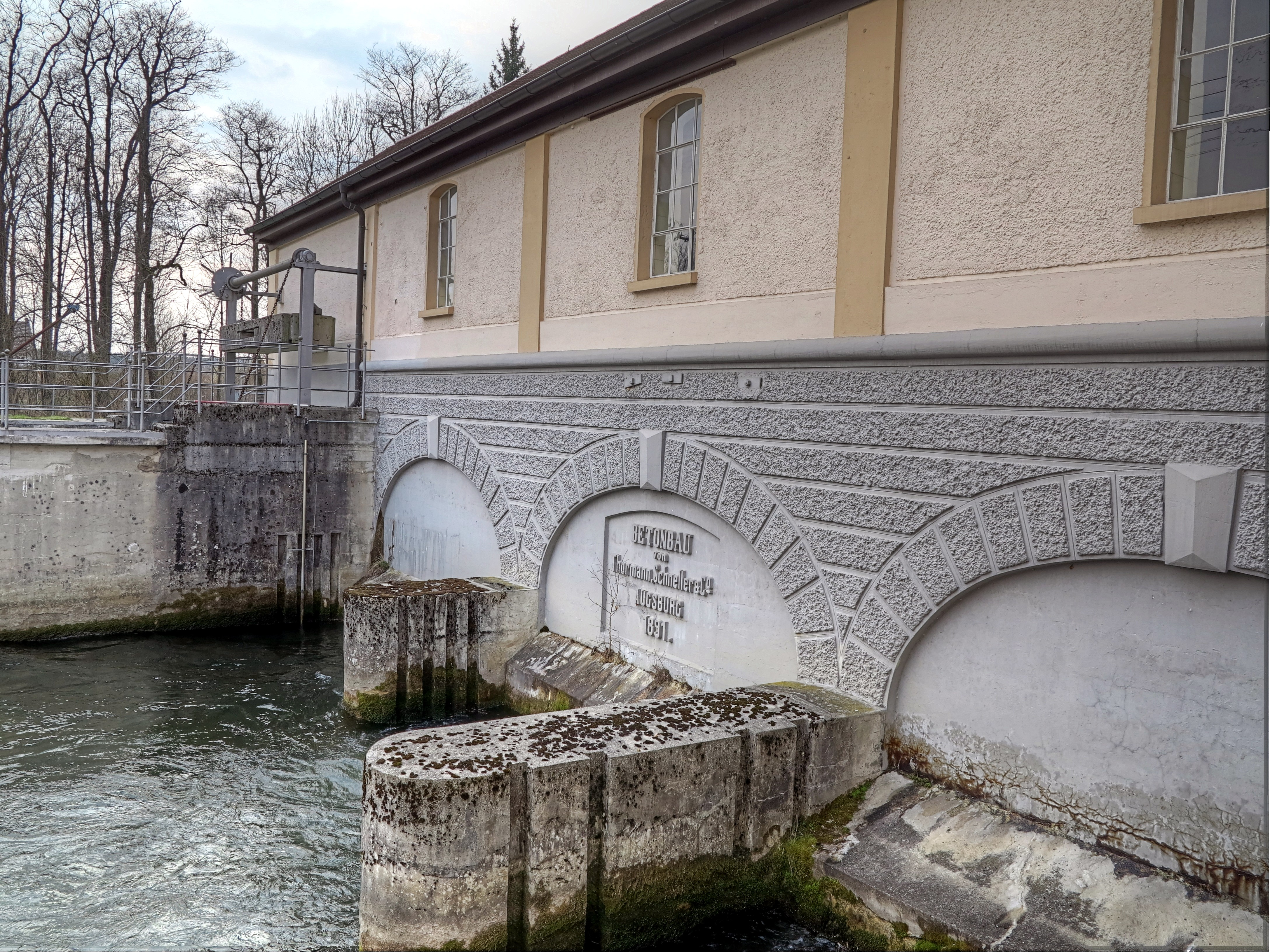 Deutschland, Bayern, Landkreis Fürstenfeldbruck, Schöngeising, Bayerns ältestes Laufwasserkraftwerk, Baujahr 1891/92, Planung: Oskar von Miller, ursprünglich mit zwei Knop-Turbinen, später mit drei Francisturbinen aus den Jahren 1911/22/27 und zwei Generatoren (1922/27)